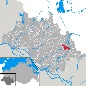 Groß Laasch in Mecklenburg-Vorpommern - district Ludwigslust